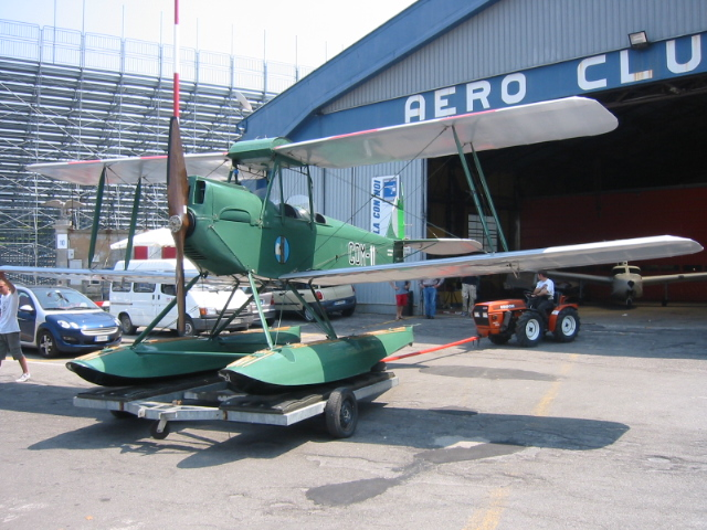 Hydravion de l'Aéro-club du Lac de Come en Italie The green seaplane is a Caproni Ca.100 Idro